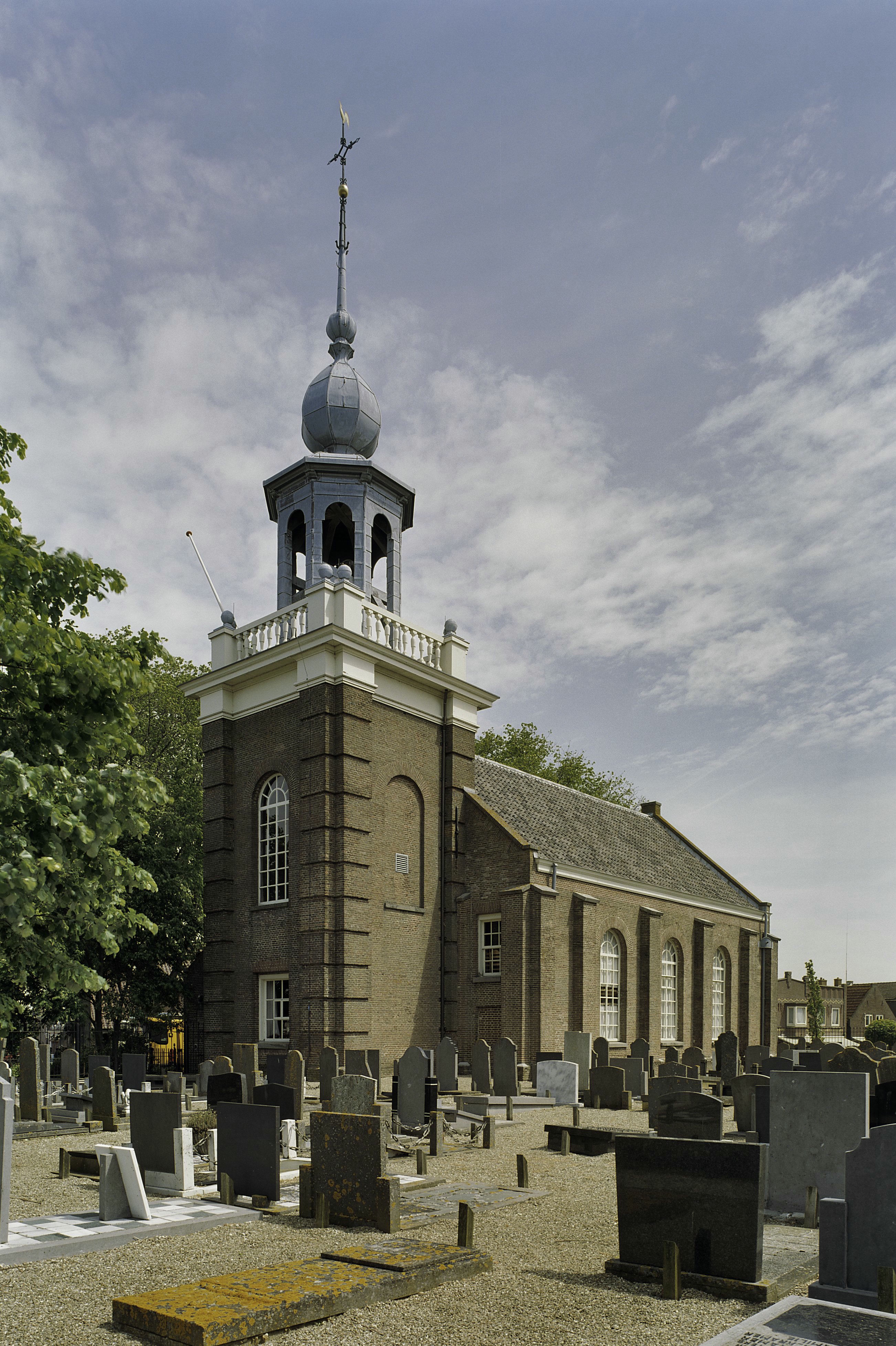 Nederlands Hervormde Kerk: Overzicht kerk met rondboogvensters en toren is voorzien van een balustrade en een achtzijdige lantaarn (opmerking: Gefotografeerd voor Monumenten In Nederland Flevoland)